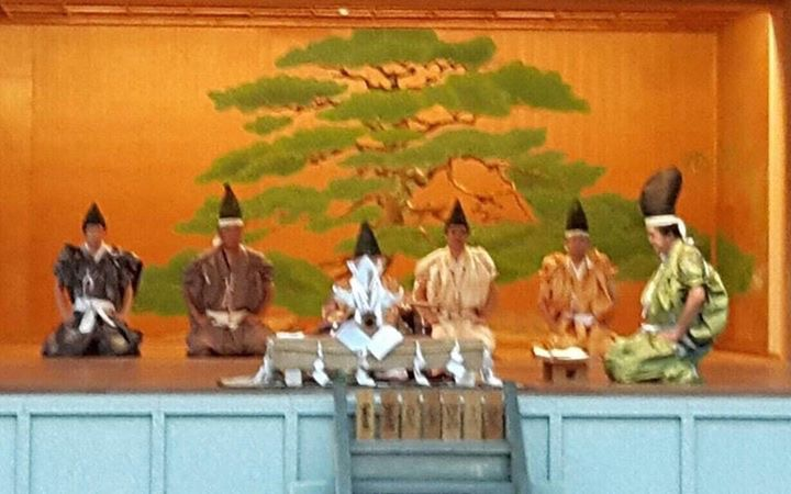 大草流覚真流 伊勢神宮